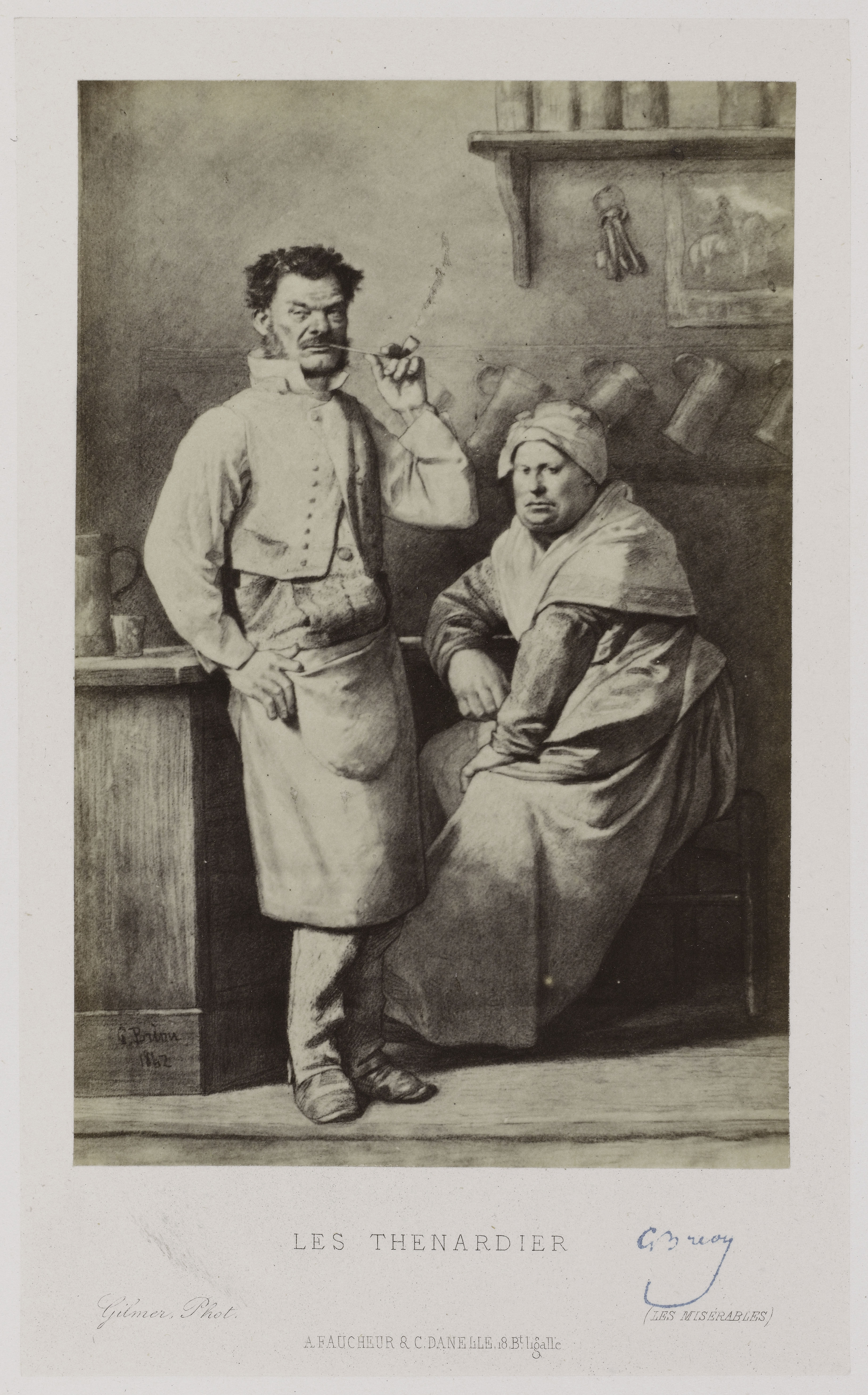 Les Misérables : "les Thénardier".